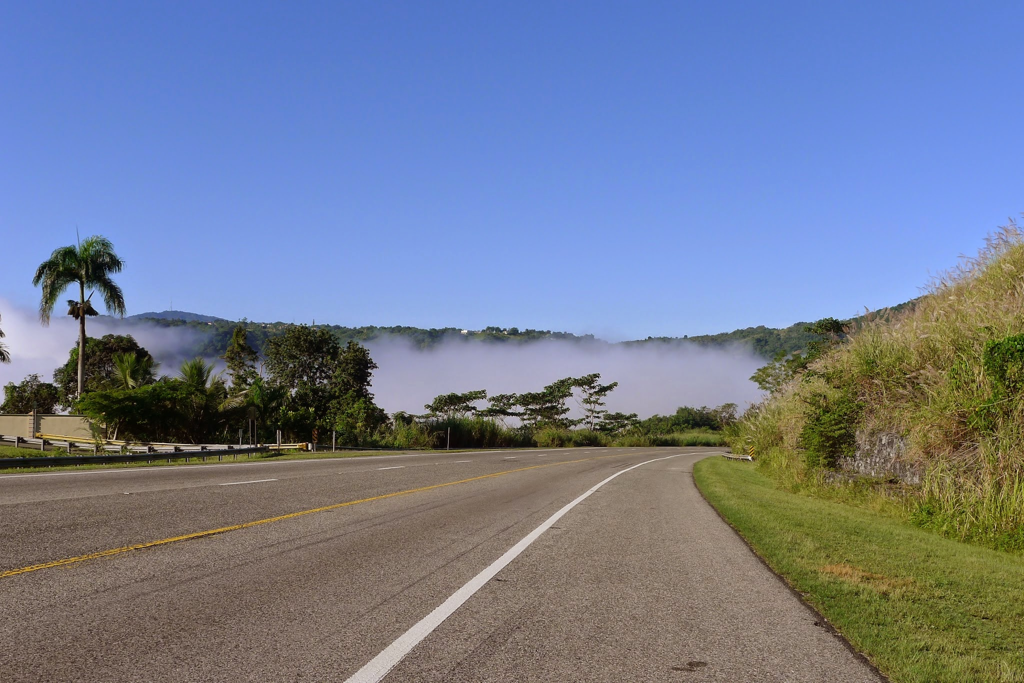 Salto Abajo, Utuado 00641, Puerto Rico